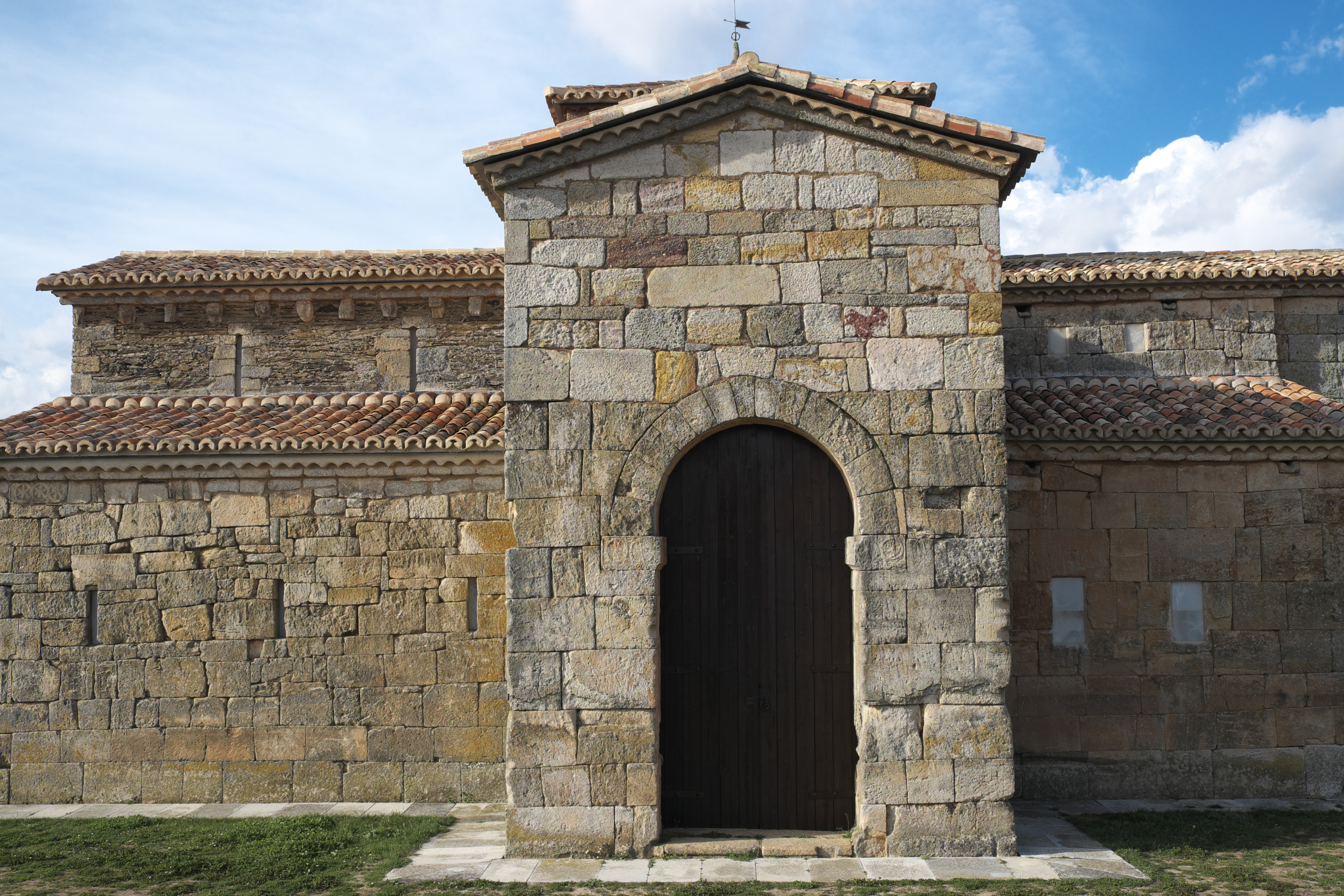 Kirche San Pedro de la Nave in El Campillo, einem Ort in der Gemeinde San Pedro de la Nave-Almendra in der Provinz Zamora (Kastilien-León/Spanien)